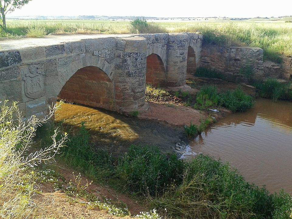 Río Jabalón pasando por el puente, verano 2016.